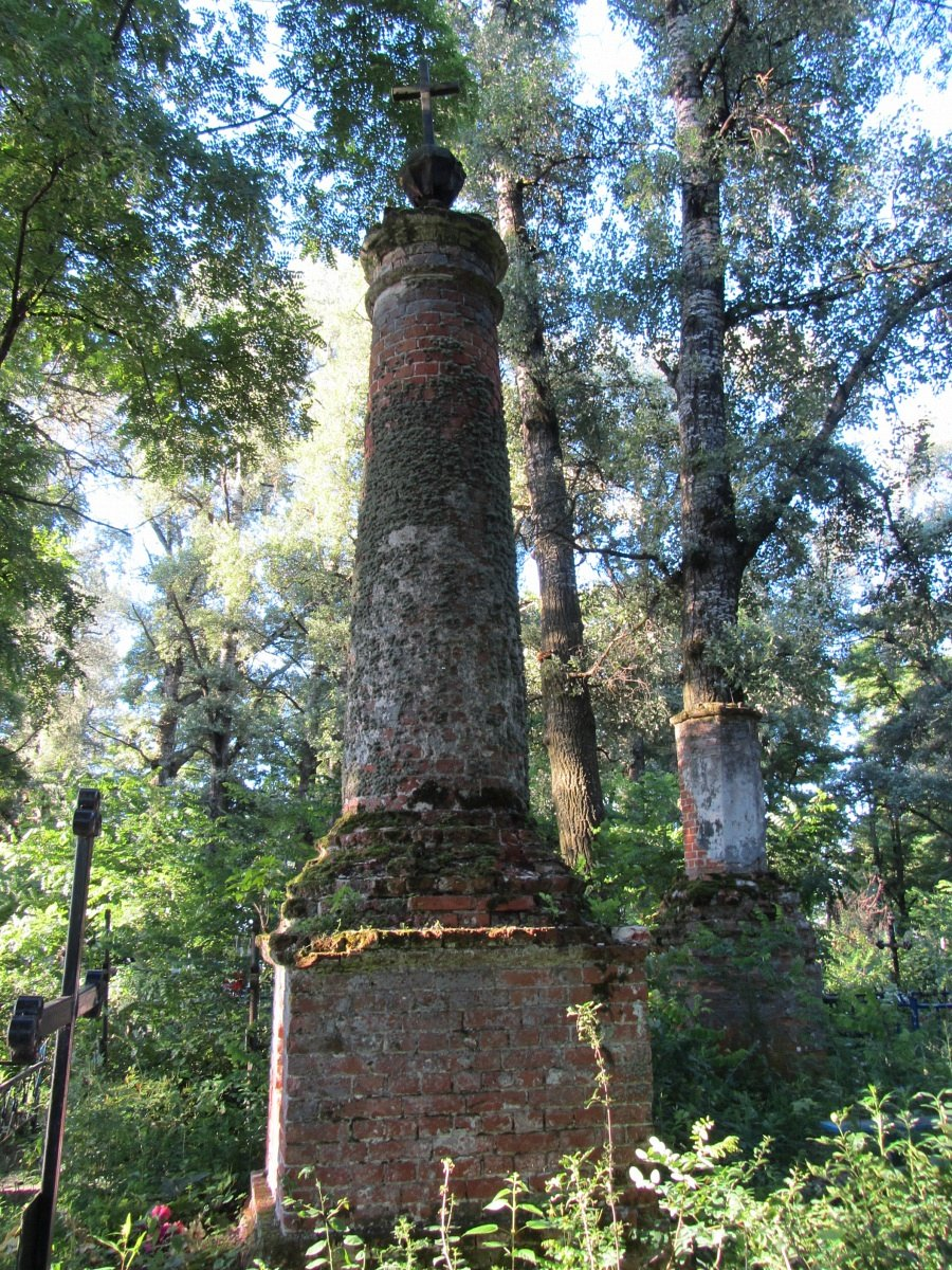 Петрыкаў. Могілкі. Надмагіллі